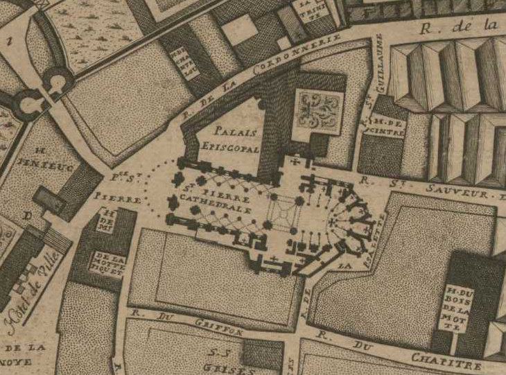 Détail du plan de Rennes de 1720 centré sur la cathédrale.